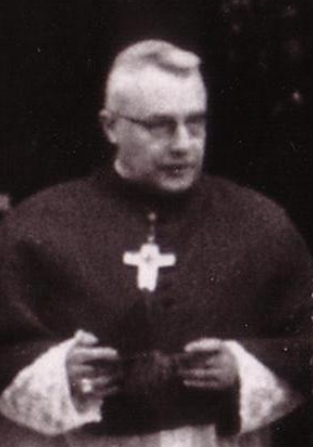 Bischof Josef Stangl bei der Einweihung der neuen Pfarrkirche St. Peter und Paul in Obernau am Main.